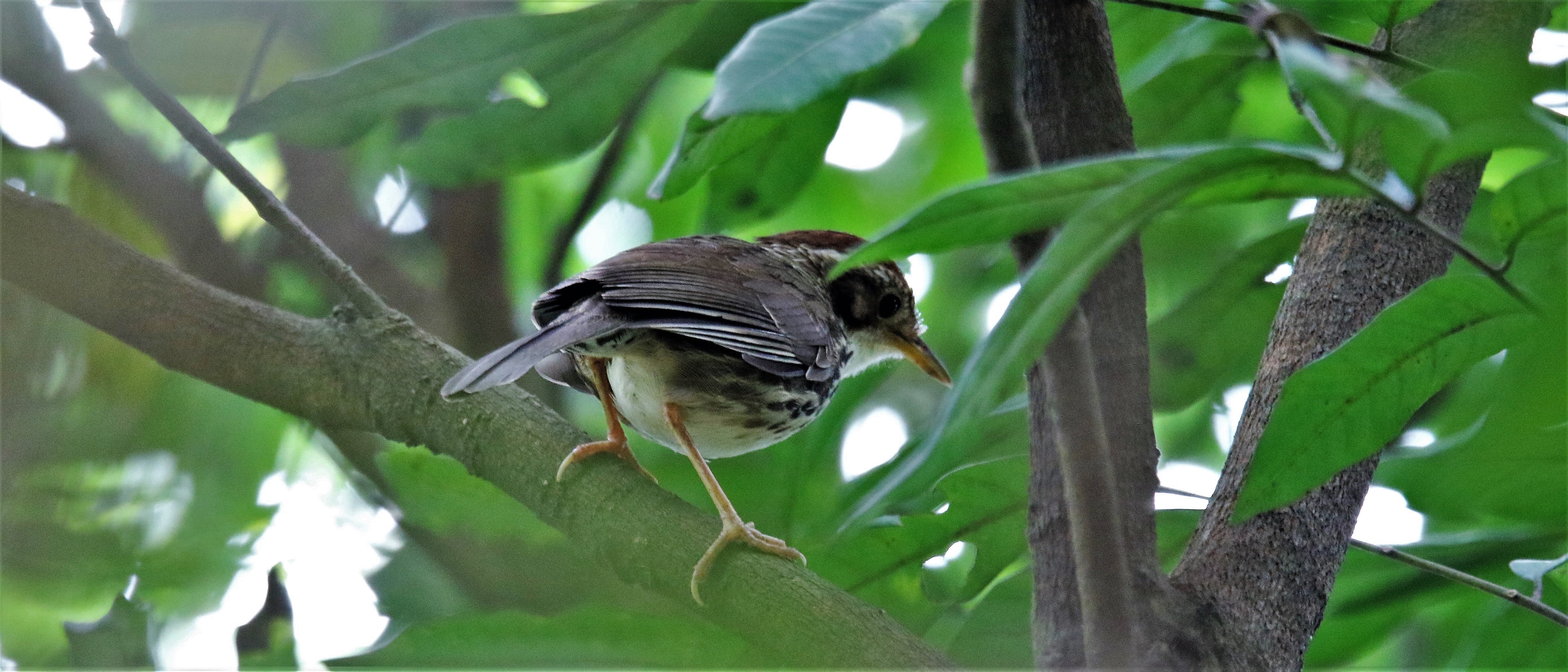 Chuối tiêu ngực đốm chụp Tại Ba Sao - Hà Nam